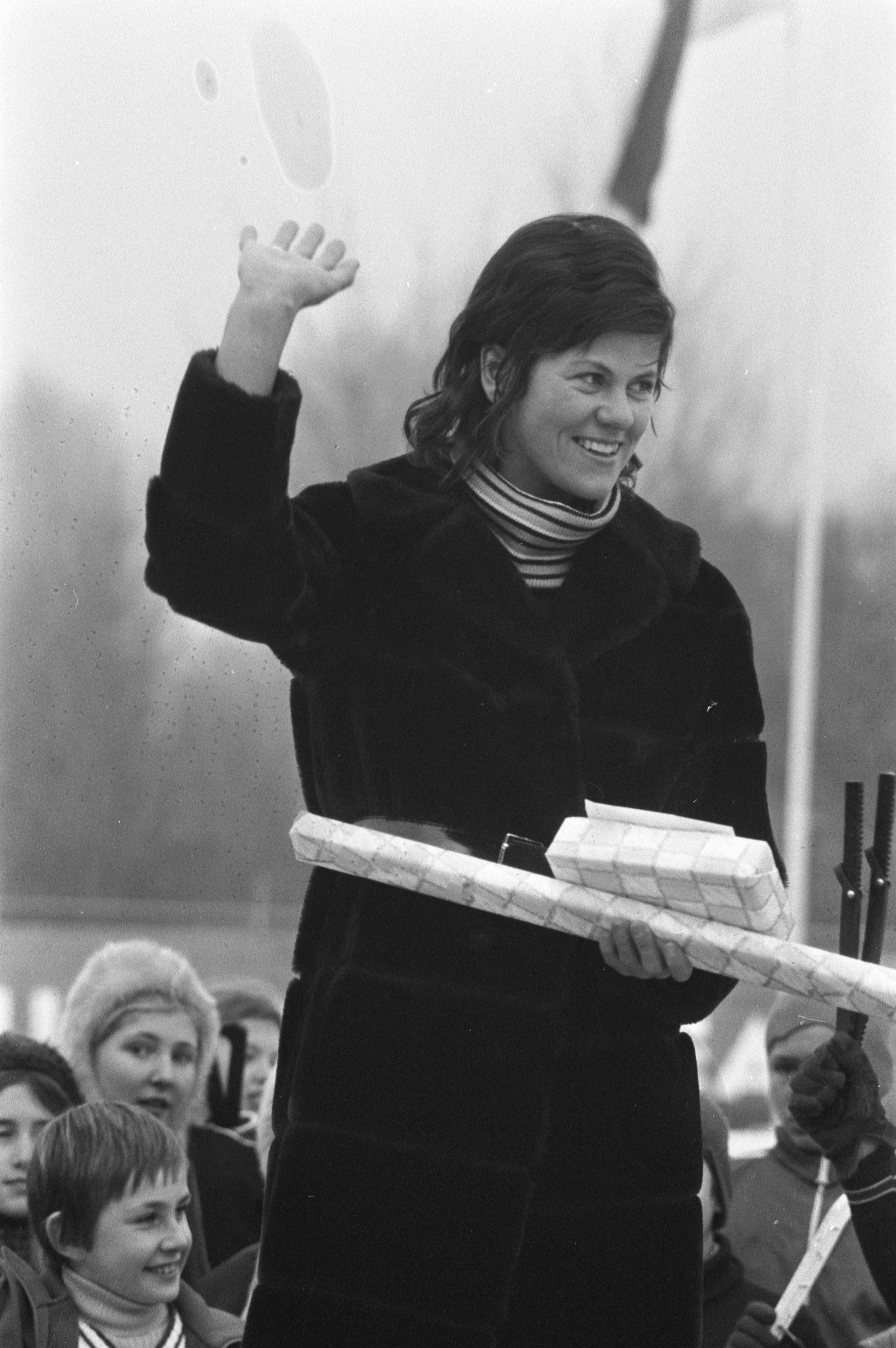 Collectie / Archief : Fotocollectie Anefo Reportage / Serie : IJsselcup schaatswedstrijden Deventer Beschrijving : Ans Schut neemt afscheid Datum : 20 november 1971 Locatie : Deventer Trefwoorden : AFSCHEID, schaatsen, sport Persoonsnaam : Schut, Ans Fotograaf : Bert Verhoeff / Anefo Auteursrechthebbende : Nationaal Archief Materiaalsoort : Negatief (zwart/wit) Nummer archiefinventaris : bekijk toegang 2.24.01.05 Bestanddeelnummer : 925-1597